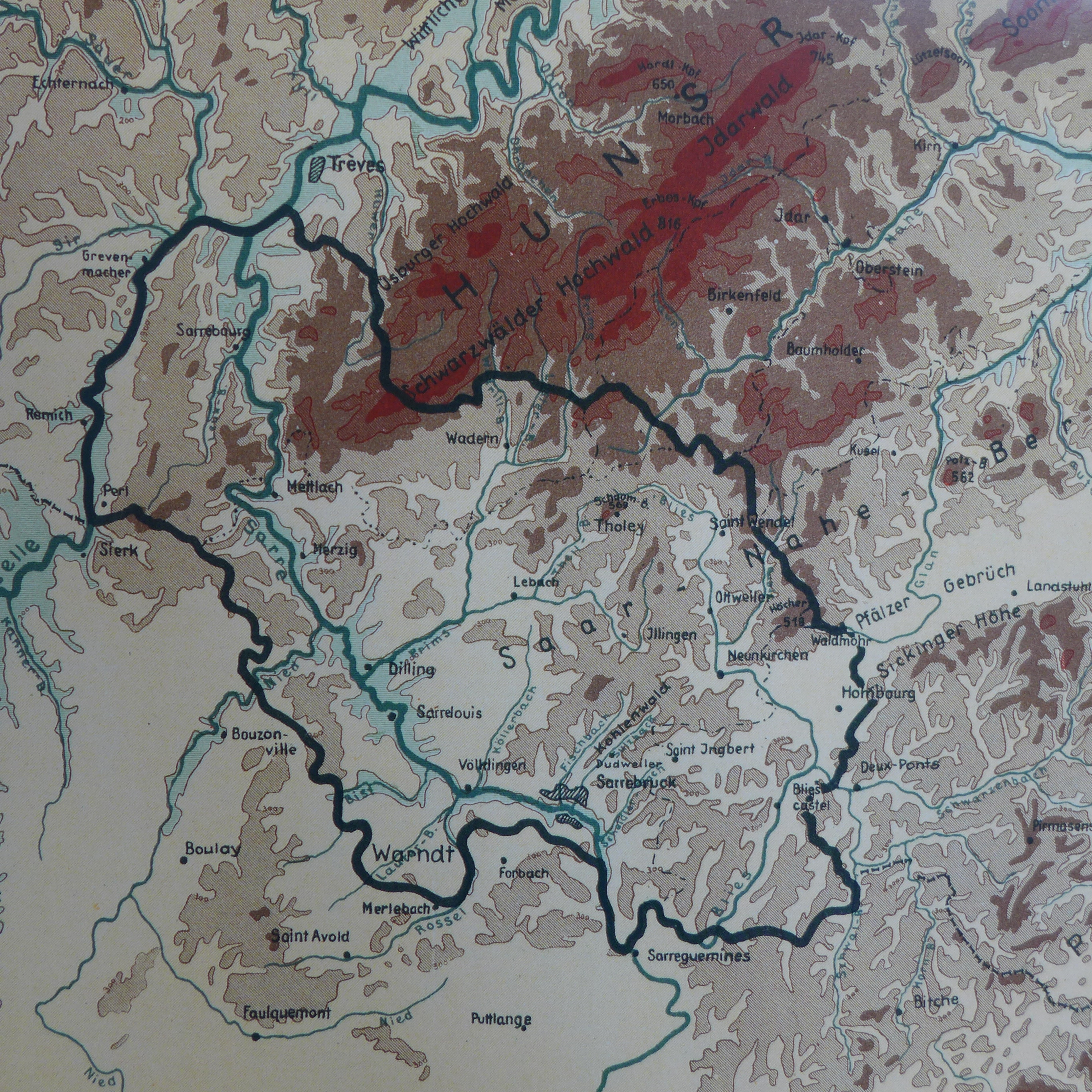 Karte des Saarlandes 1946/1947, Gouvernement Militaire de la Sarre, Section Urbanisme et Reconstruction (Hrsg.): Urbanisme en Sarre, 1947, Kartenmaßstab: 1 : 600.000, Maße: 29,5 x 20,8 cm, Sammlung Hans-Walter Herrmann, Riegelsberg